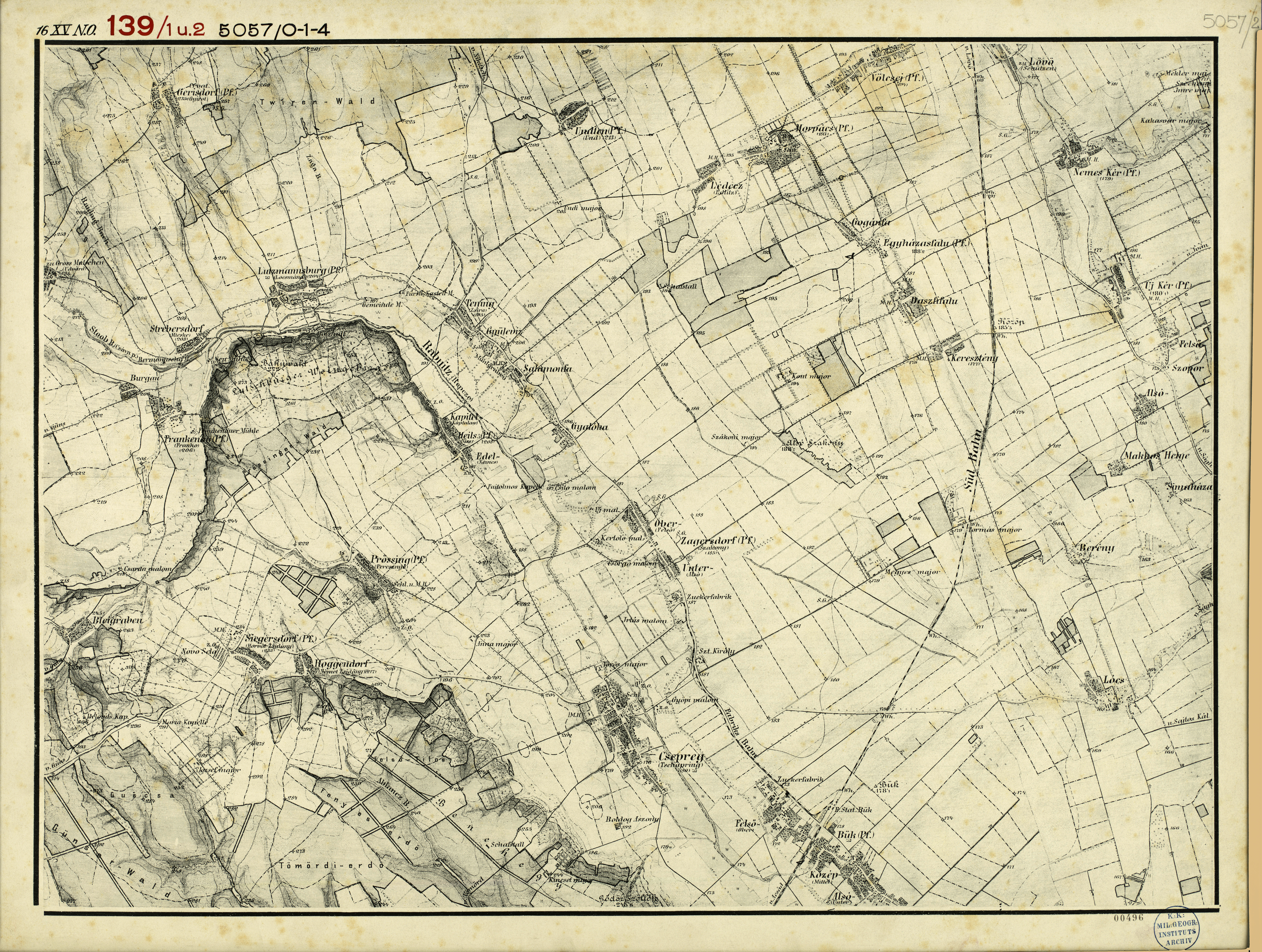 historische Landkarte: Arbeitsfassung von: Gradkartenblatt Zone 16 Colonne XV Section NO (Nordost) (später 5057/2 oder 5057/0-1-4 oder 139/1 und 2). Lutzmannsburg, Zagersdorf, Prössing, Undten, Pressing, Völcsej, Horpacs, Croatisch Gerisdorf, Bük, Csepreg in Westungarn, später Mittelburgenland. Franzisco-josephinische (3.) Landesaufnahme der österreichisch-ungarischen Monarchie. Maßstab 1:25.000. Keine Angaben über den Stand (um 1880)